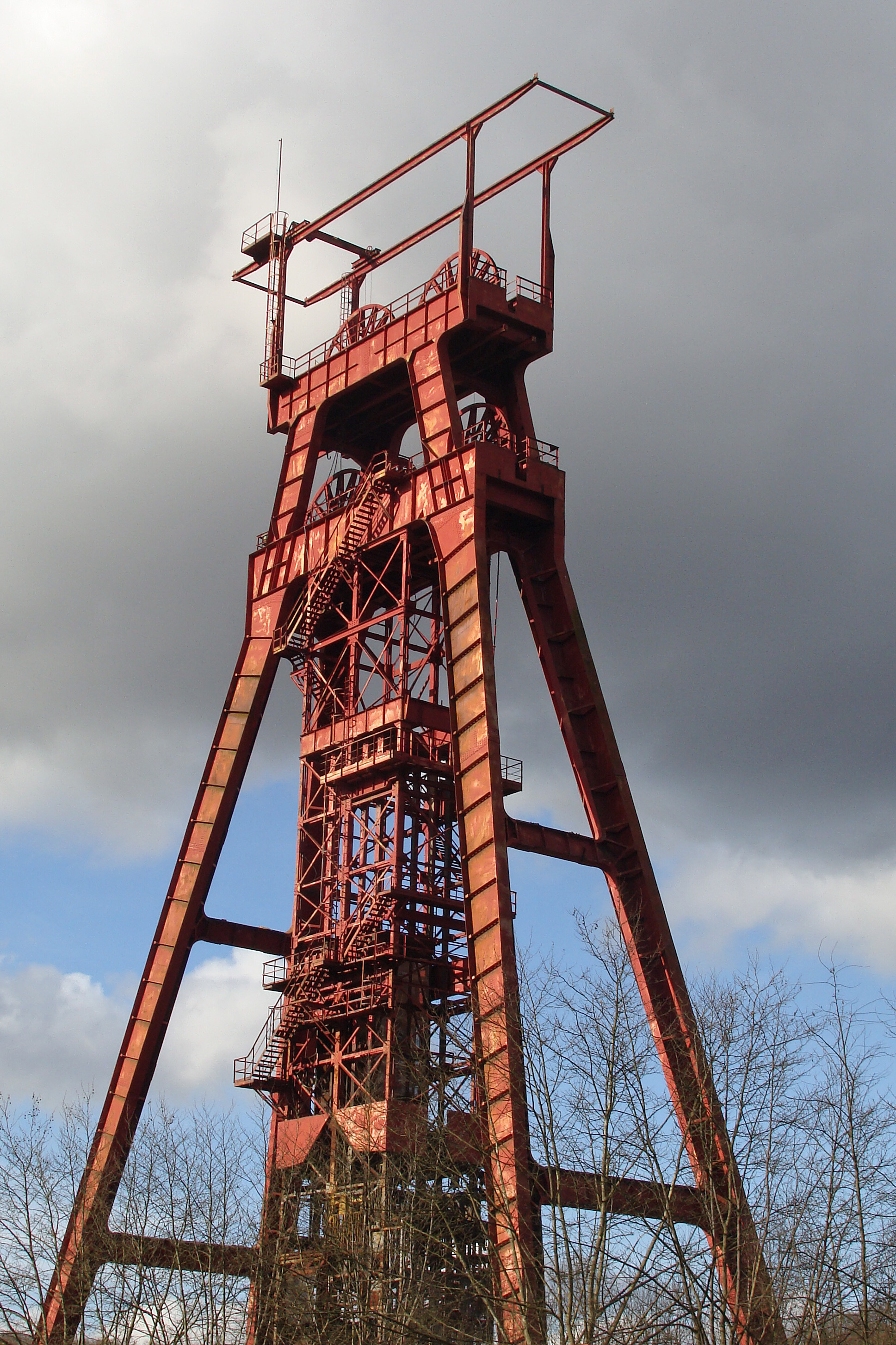 Puits de Sainte-Fontaine (actuellement commune de Saint-Avold, commune de L'Hôpital de 1941 à 1949). Foncé en 1908. Profondeur: 1036,83m. Appelé aussi puits Waldemar Müller. Photographié le 17 février 2014.